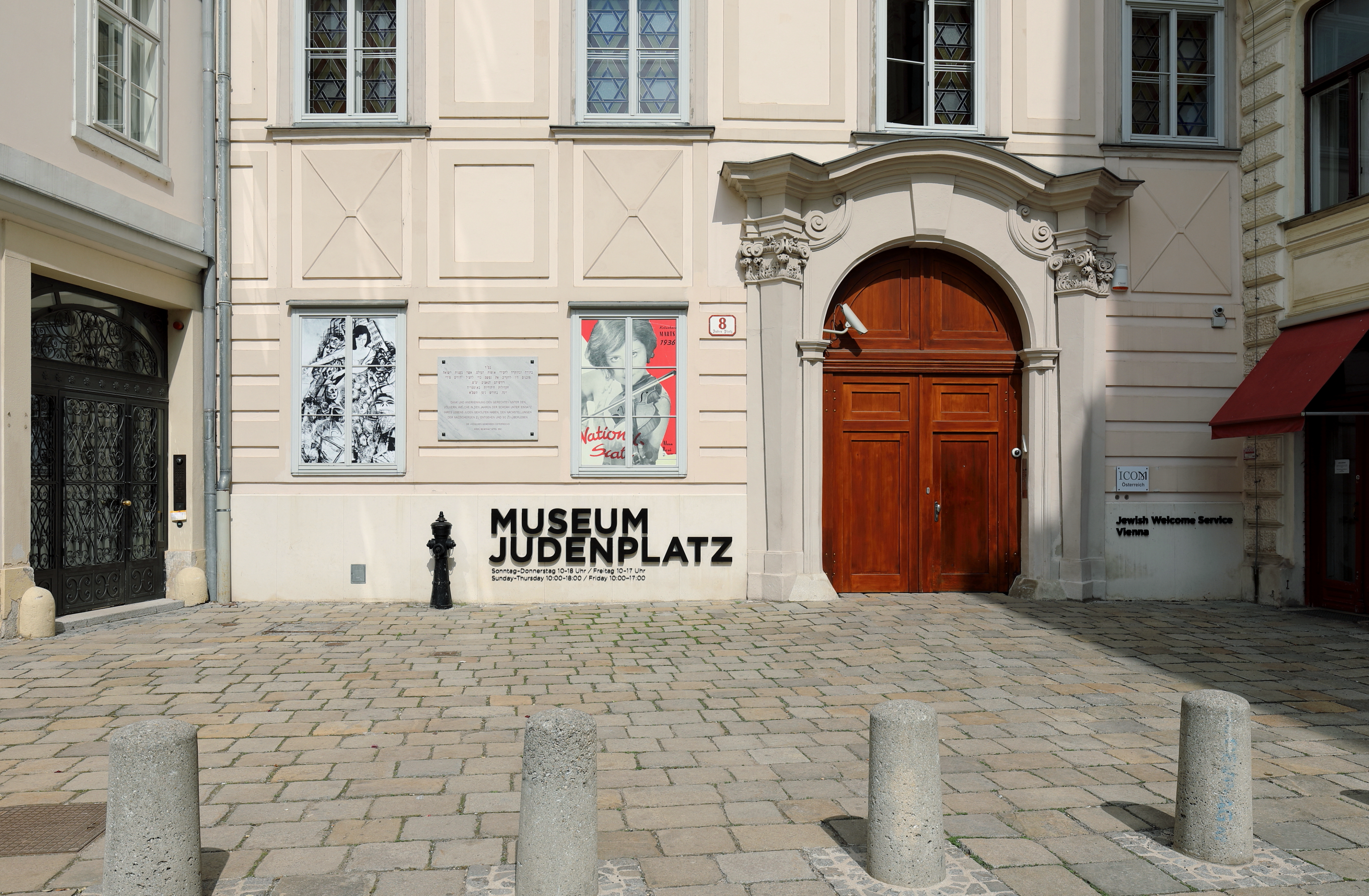 Der Eingangsbereich des „Museums Judenplatz“ im 1. Wiener Gemeindebezirk Innere Stadt. Das Museum befindet sich im Misrachi-Haus und ist eine Zweigstelle des Jüdischen Museums im Palais Eskeles.